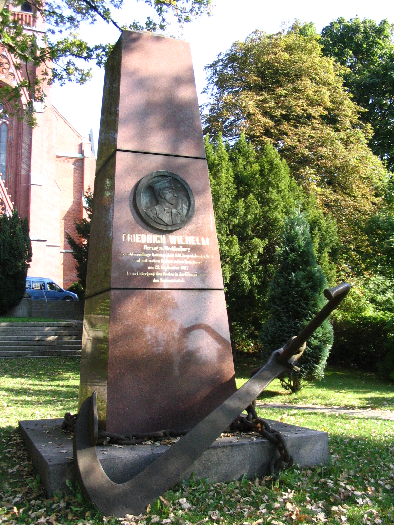 Herzog Friedrich Wilhelm Denkmal ( von Bildhauer Ludwig Brunow